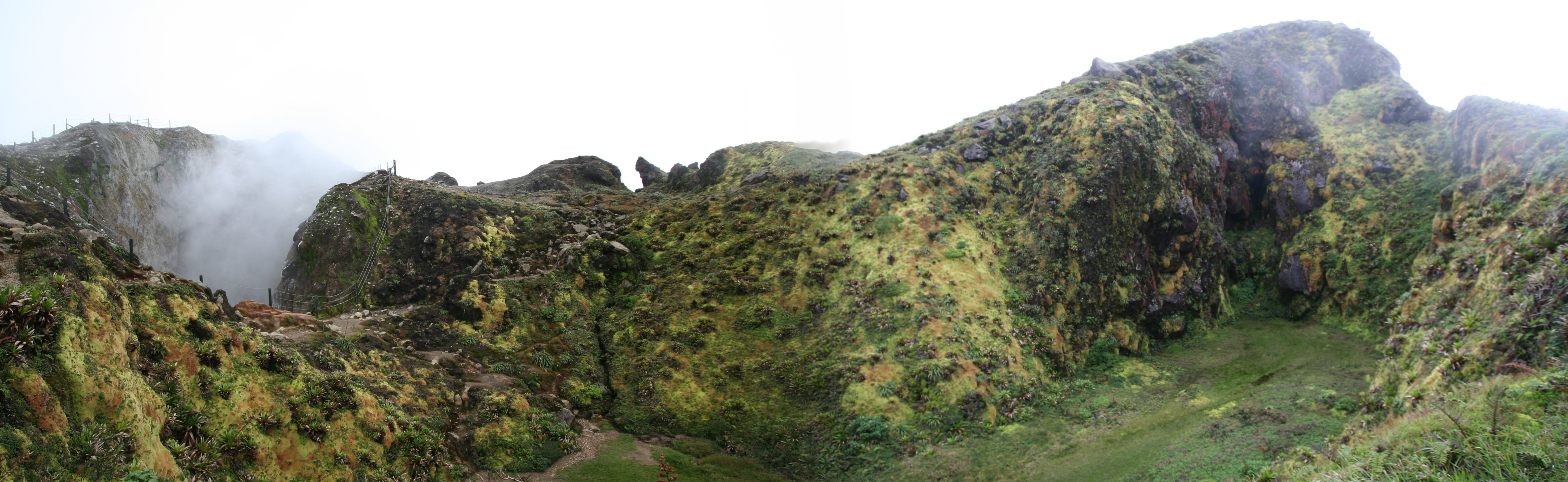 Sommet du volcan de la Soufrière - Guadeloupe. Gouffre Tarissan à gauche et gouffre Dupuy à droite.